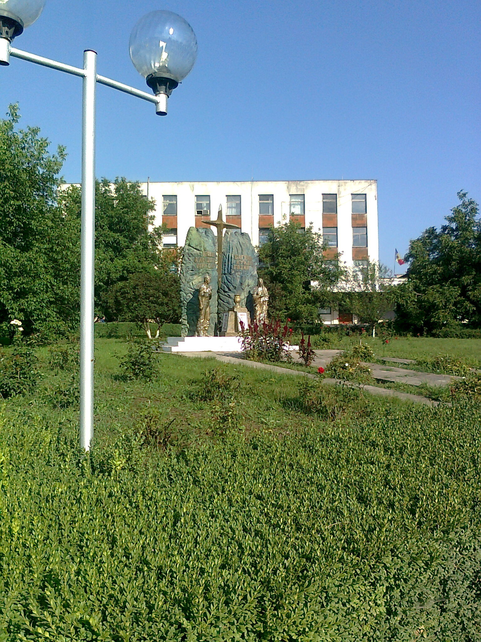 Glodeni, Republica Moldova